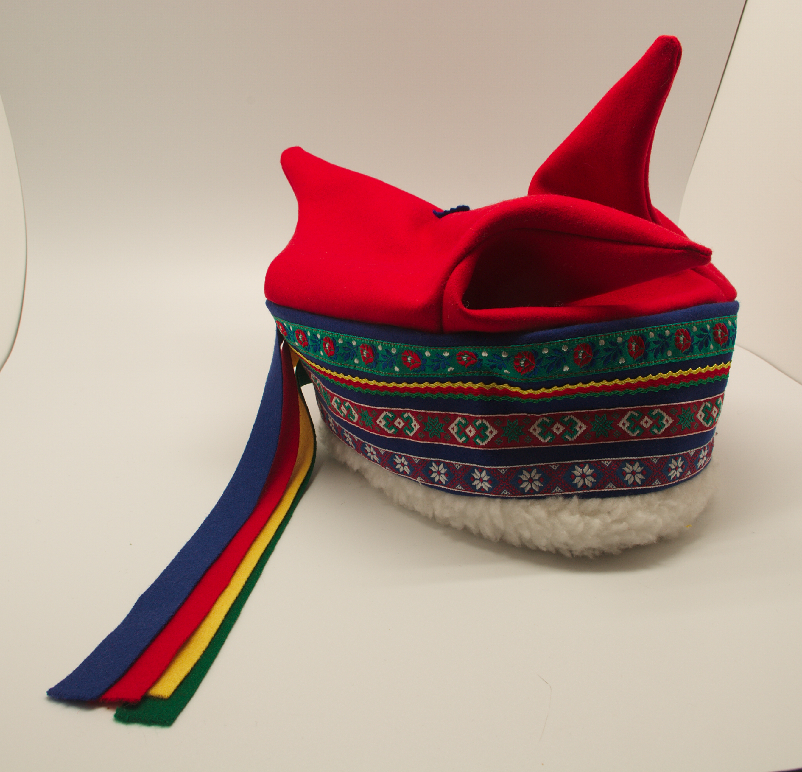 Mütze der Samen